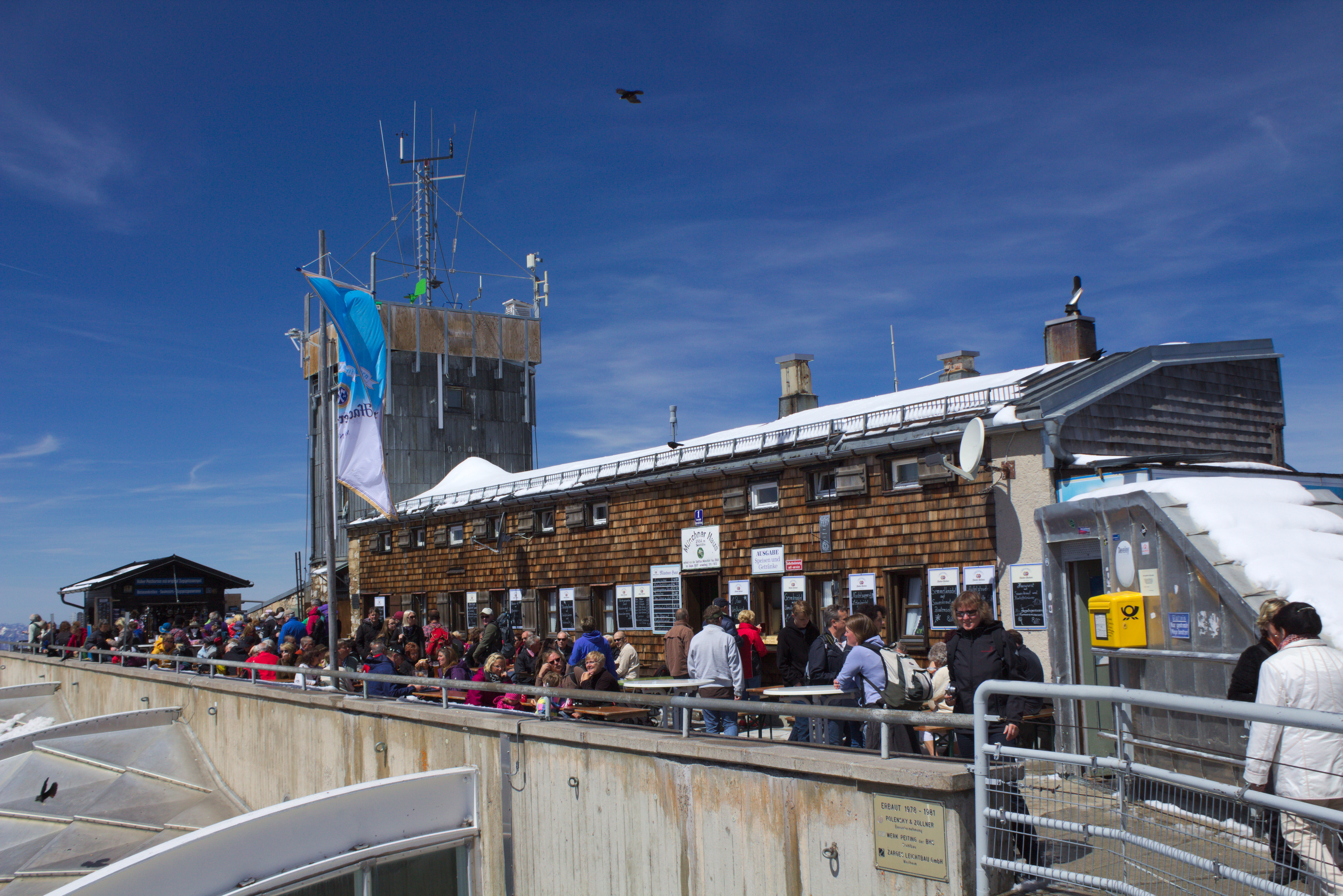 Zugspitzgipfel. Im Bild das Münchner Haus sowie der Turm der Wetterwarte.